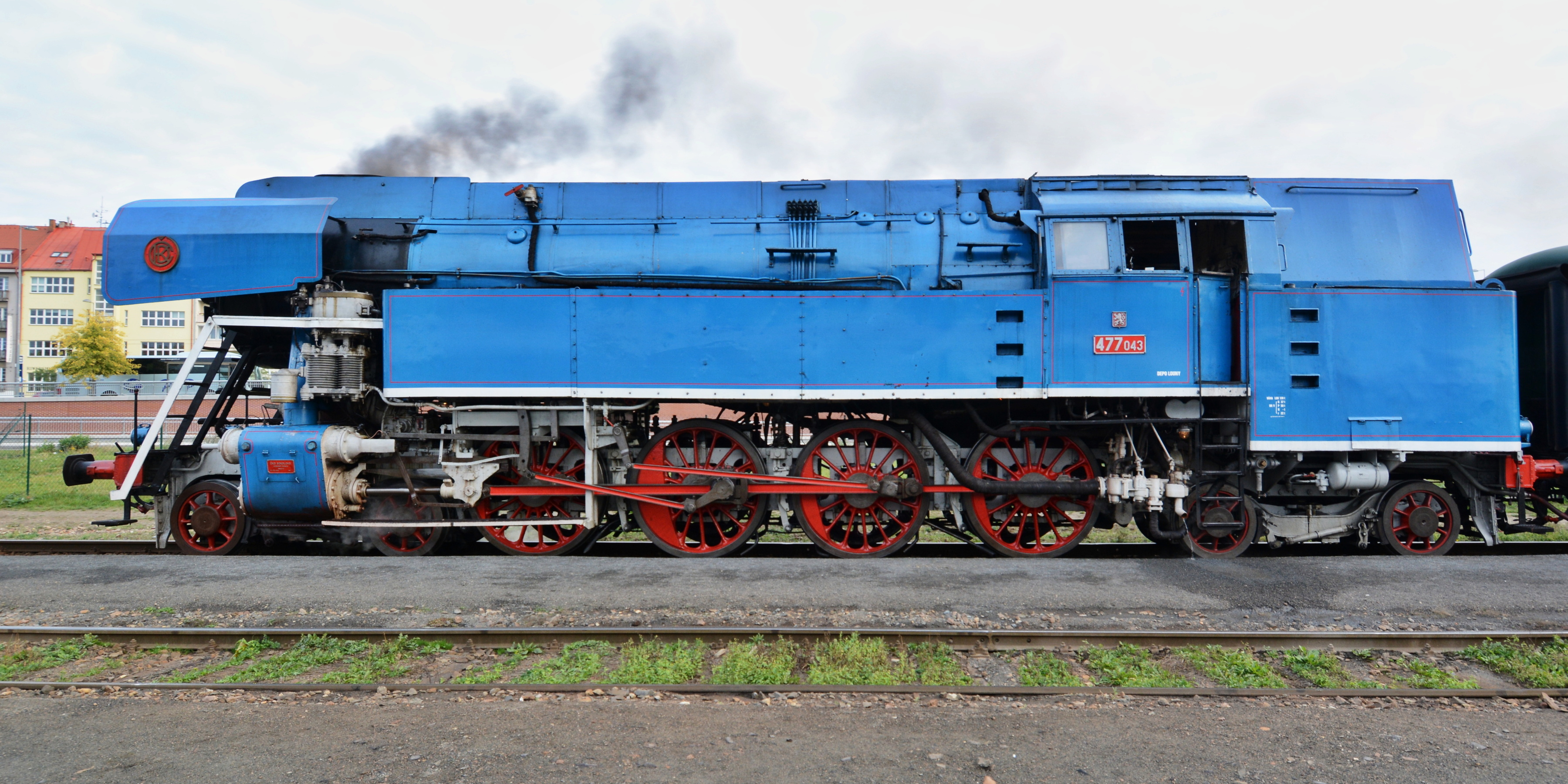 Lokomotiva 477.043 na nádraží Praha - Dejvice.